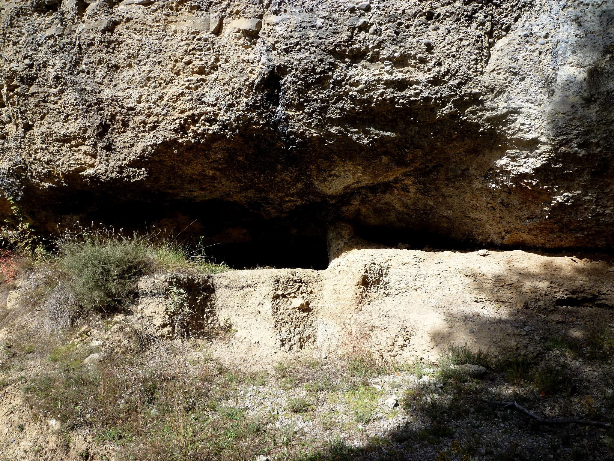 Coneguda com Balma de Guilanyà. Jaciment arqueològic.